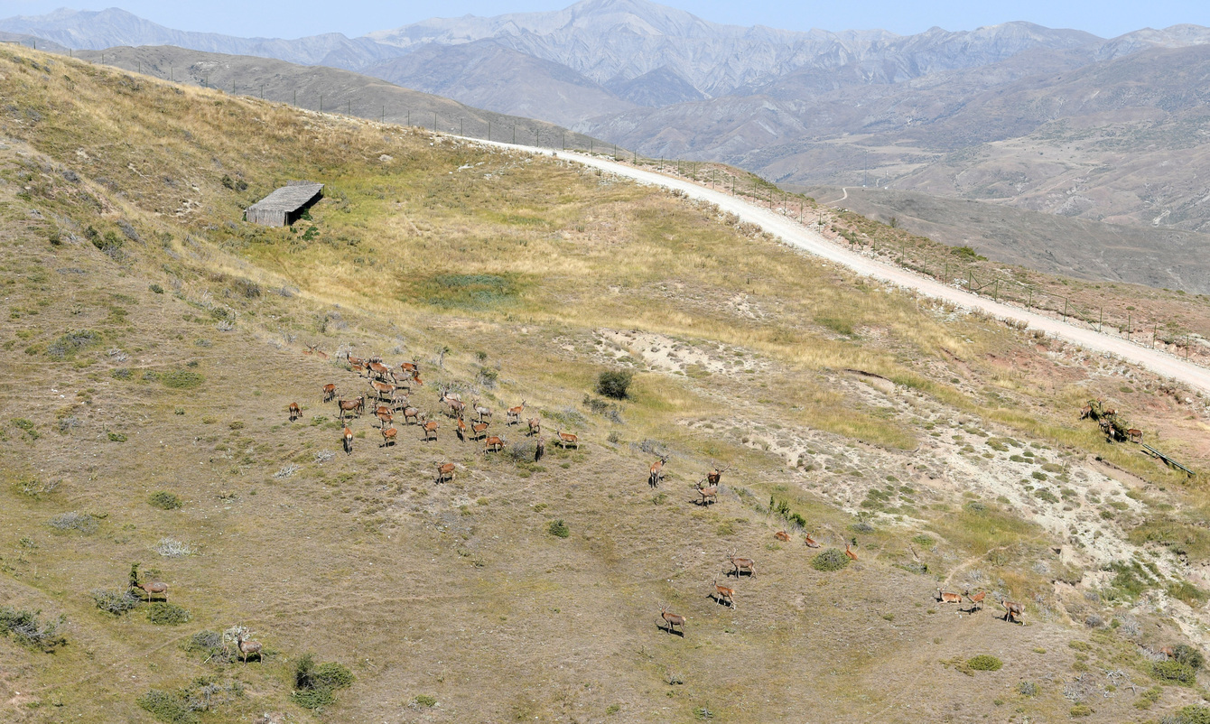 Шамахинский сафари-парк